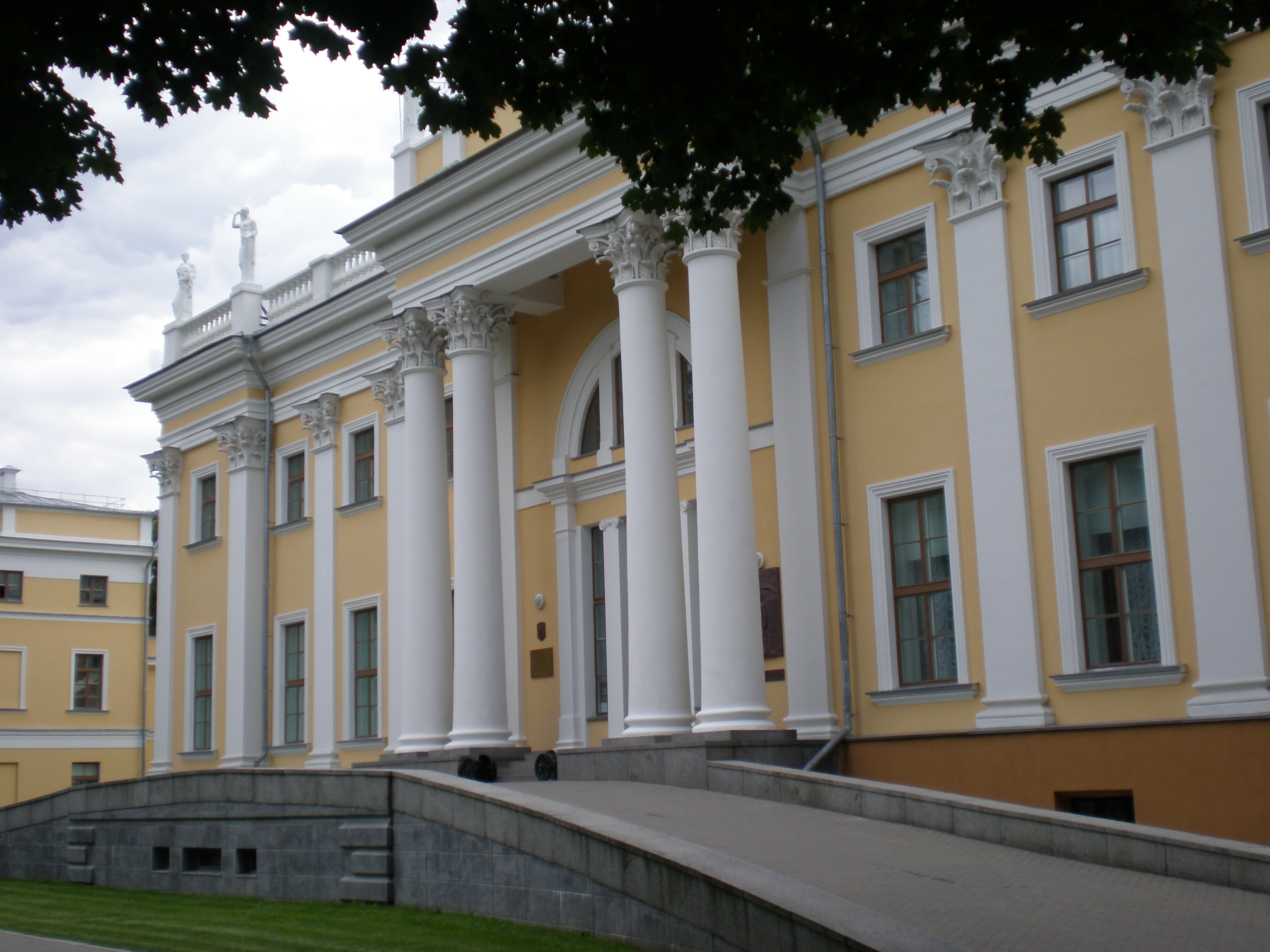 Дворец Румянцевых — Паскевичей